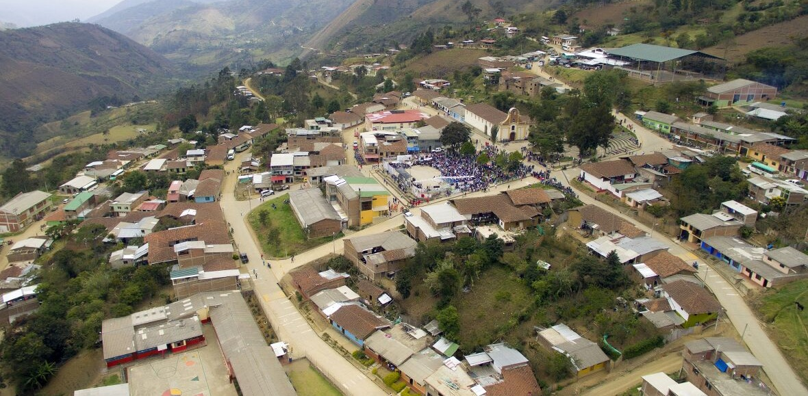 Panorámica del área urbana de Jambaló (Cauca - Colombia)